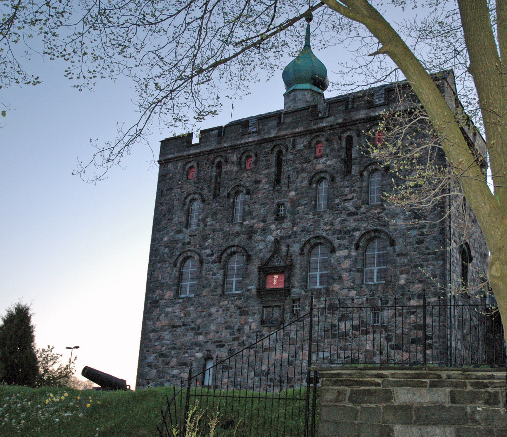 Rosenkratztårnet